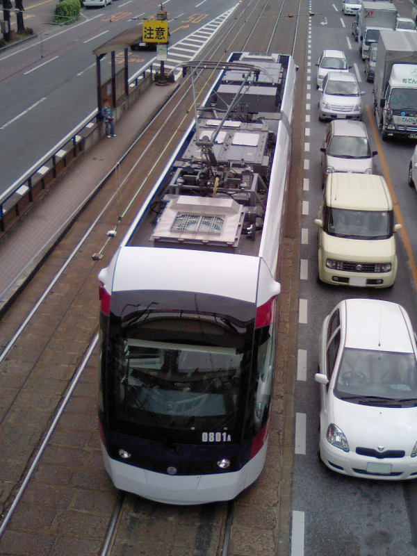 熊本市電0801AB (九品寺交差点電停)